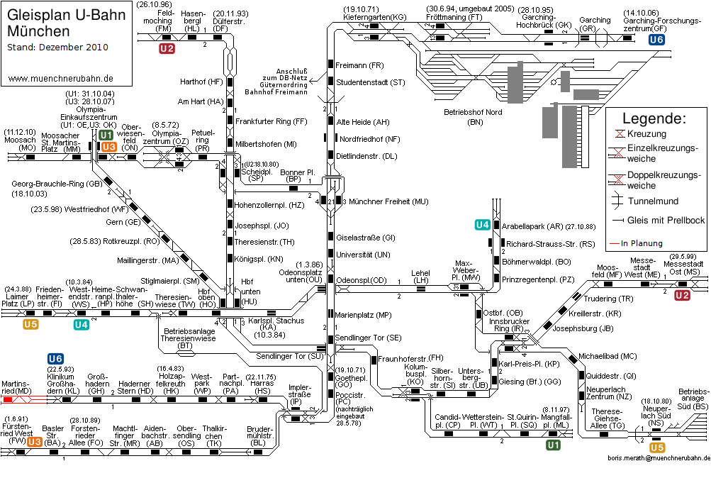 Gleisplan der Münchner U-Bahn, Stand 2010